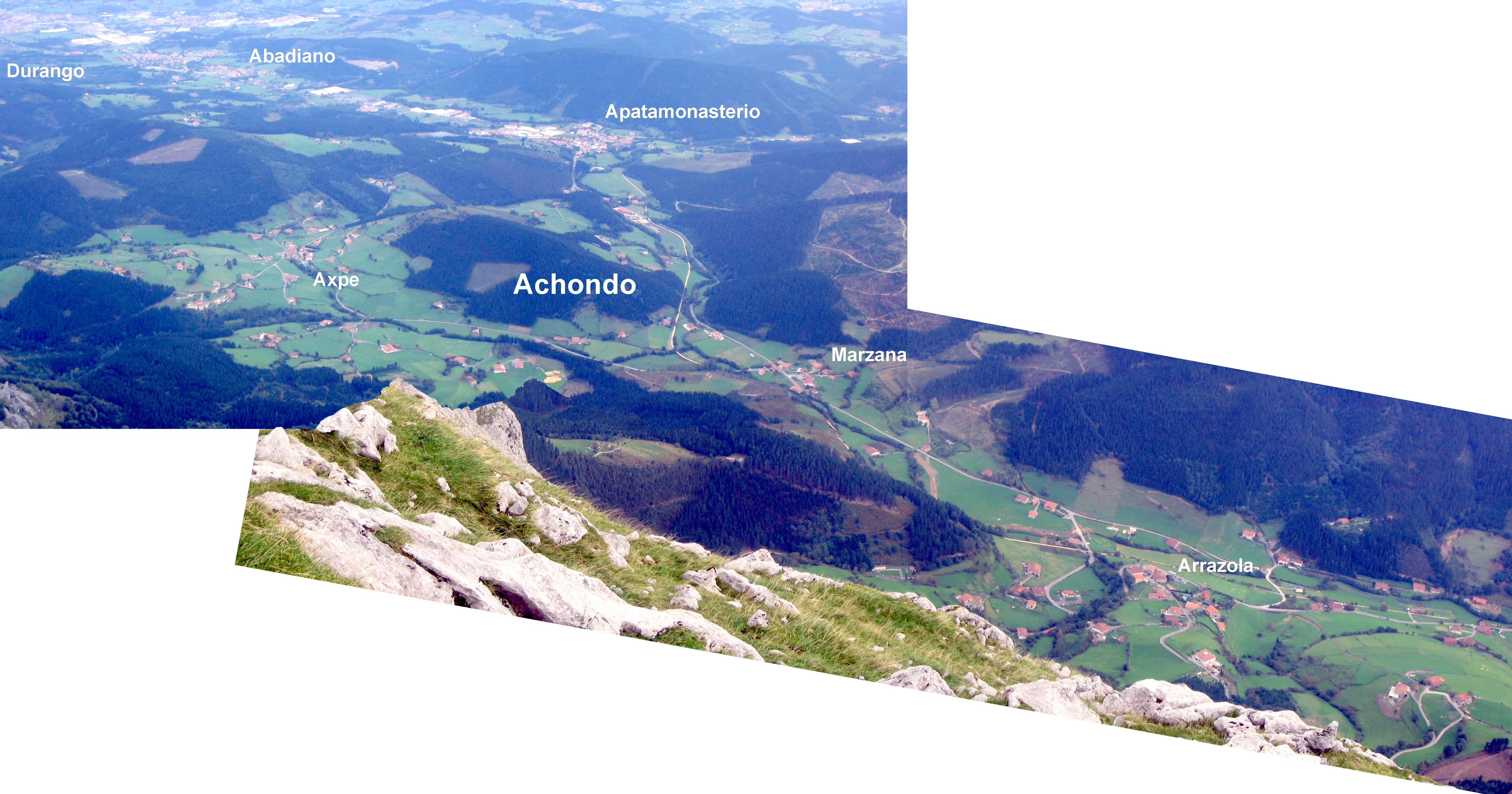 Composición del Duranguesado con el valle de Atxondo en donde se ven los núcleos de las tres anteiglesias que componen el municipio rotulando los mismos y los núcleos urbanos de Durango y Abadiño. Vizcaya, País Vasco (España).